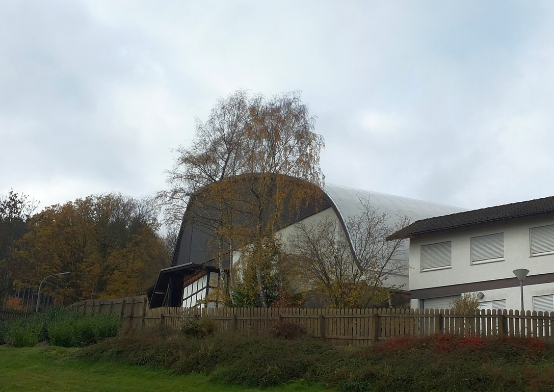 Freilichtbühne Hallenberg (Germany)